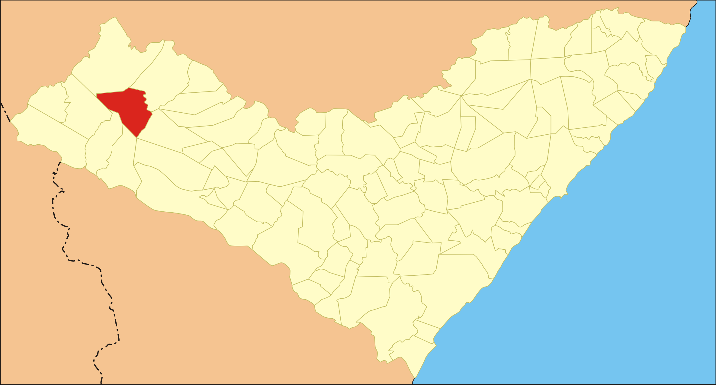 Localização da cidade em Alagoas